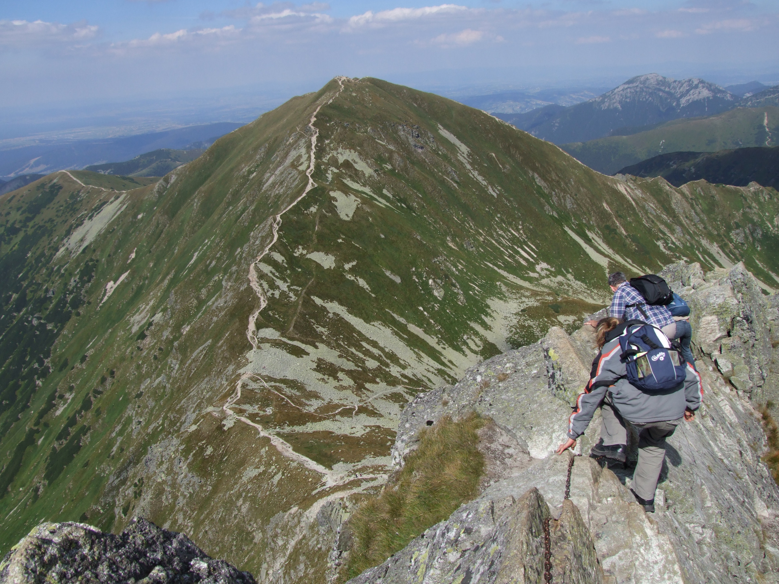 Ostrý Rohač (Ostry Rohacz), Volovec (Wołowiec) - West Tatra Mountains